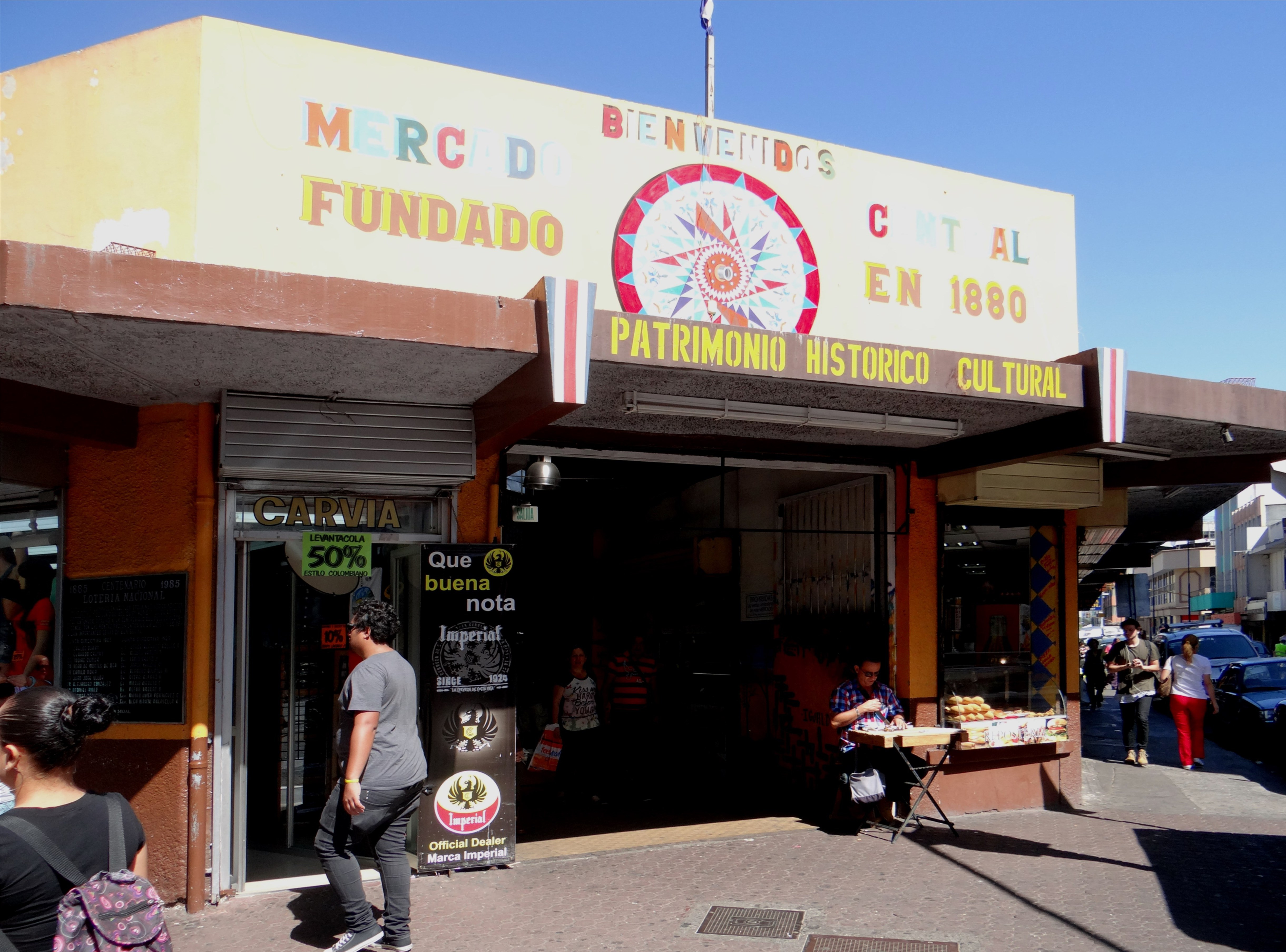 Entrée du marché central, San José, Costa Rica.